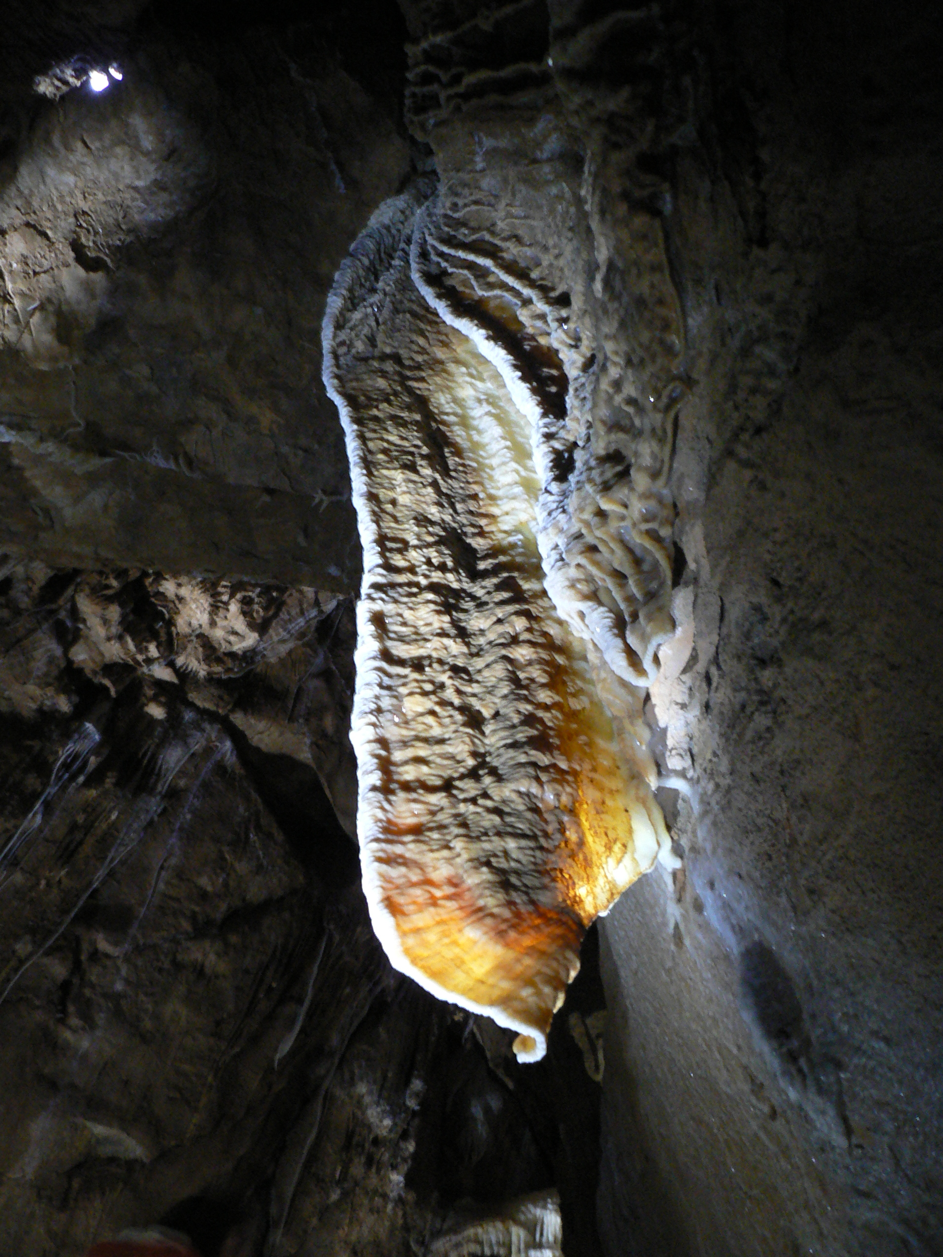 Herbstlabyrinth